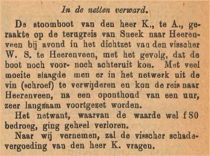 een stoomboot vaart over de netten van een visser